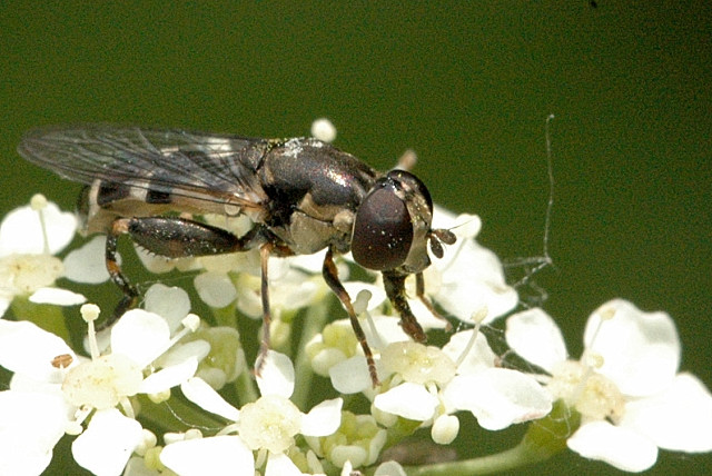 female Syritta pipiens from Commanster, Belgium.